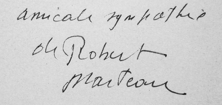 Signature du poète français Robert Marteau (1925-2011)